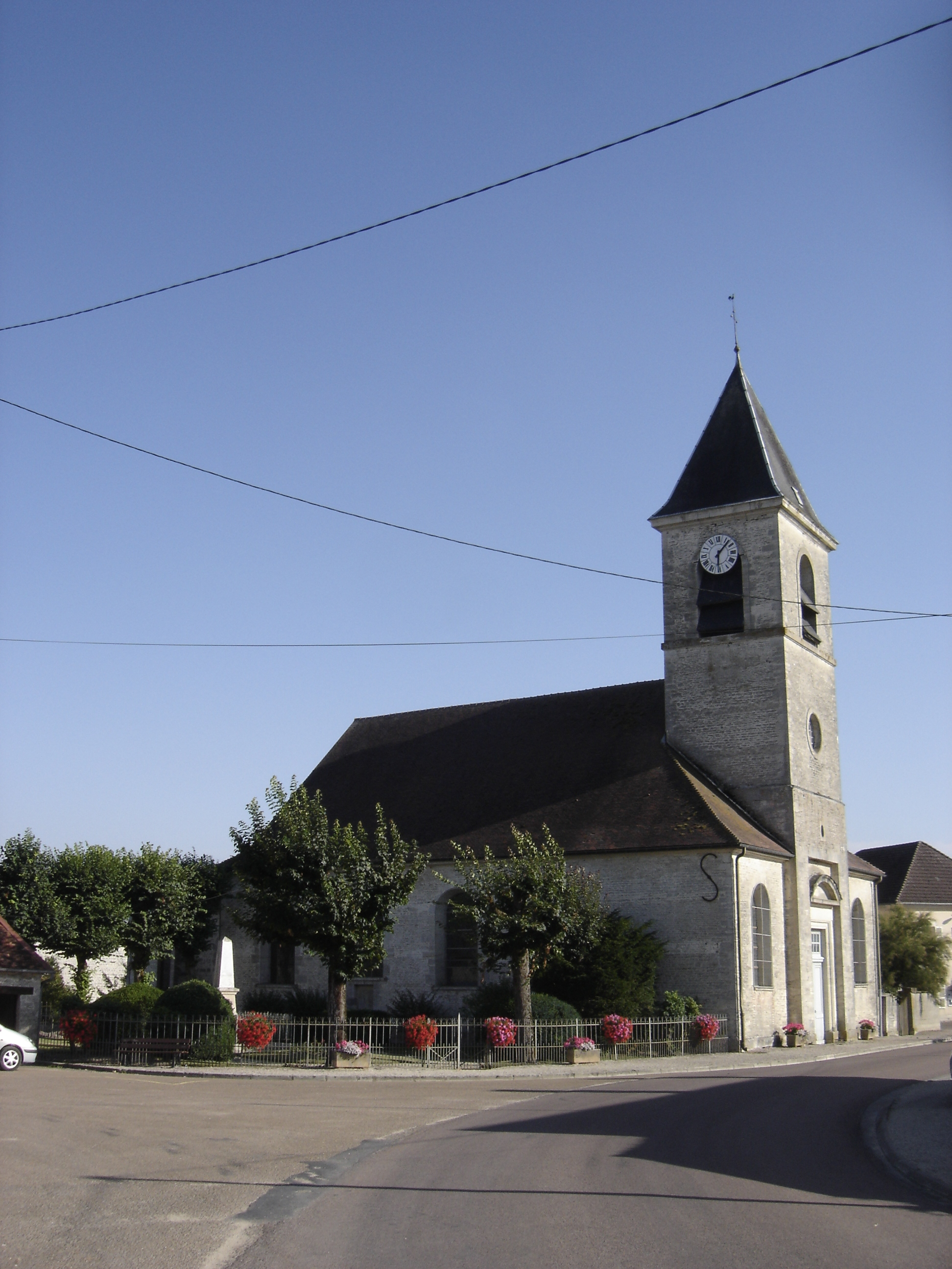 église de Bligny - Aube - France